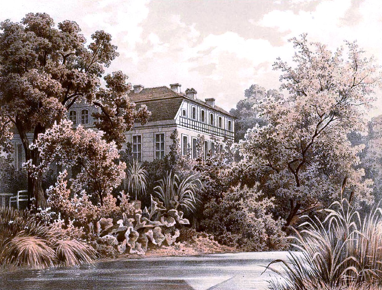 Gut Gulben, Kreis Cottbus